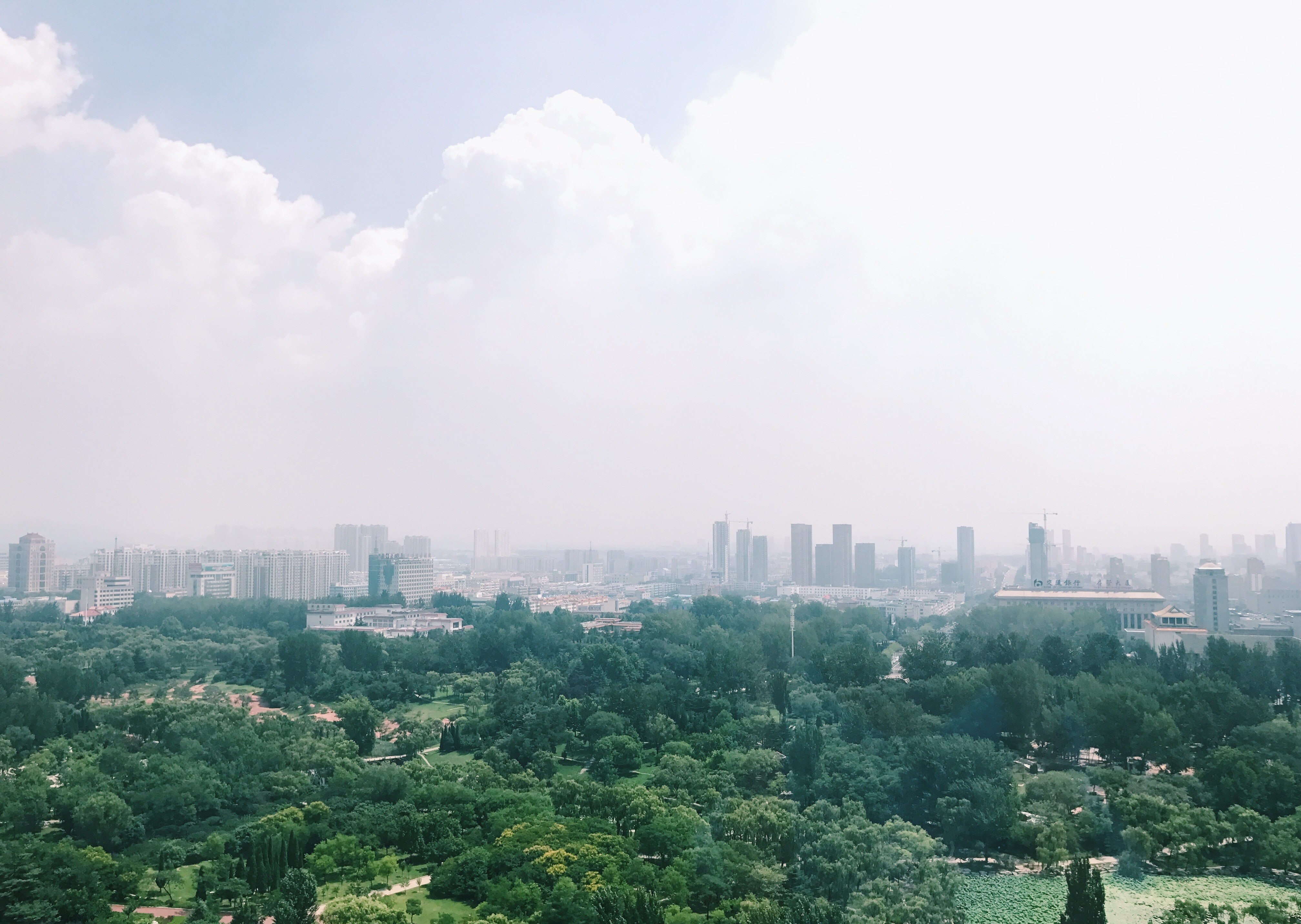 莱芜市核心城区天际线